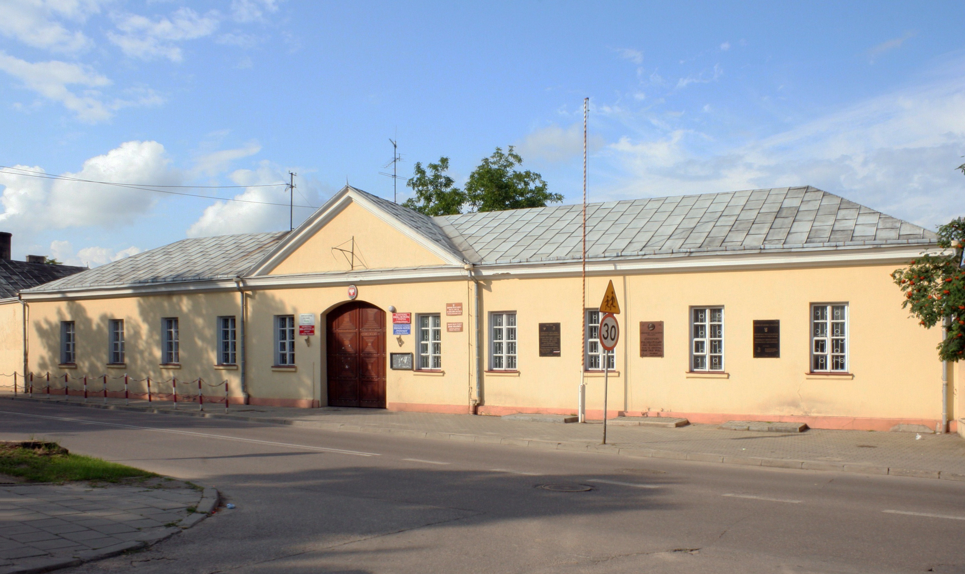 Szkoła w Bielsku Podlaskim.